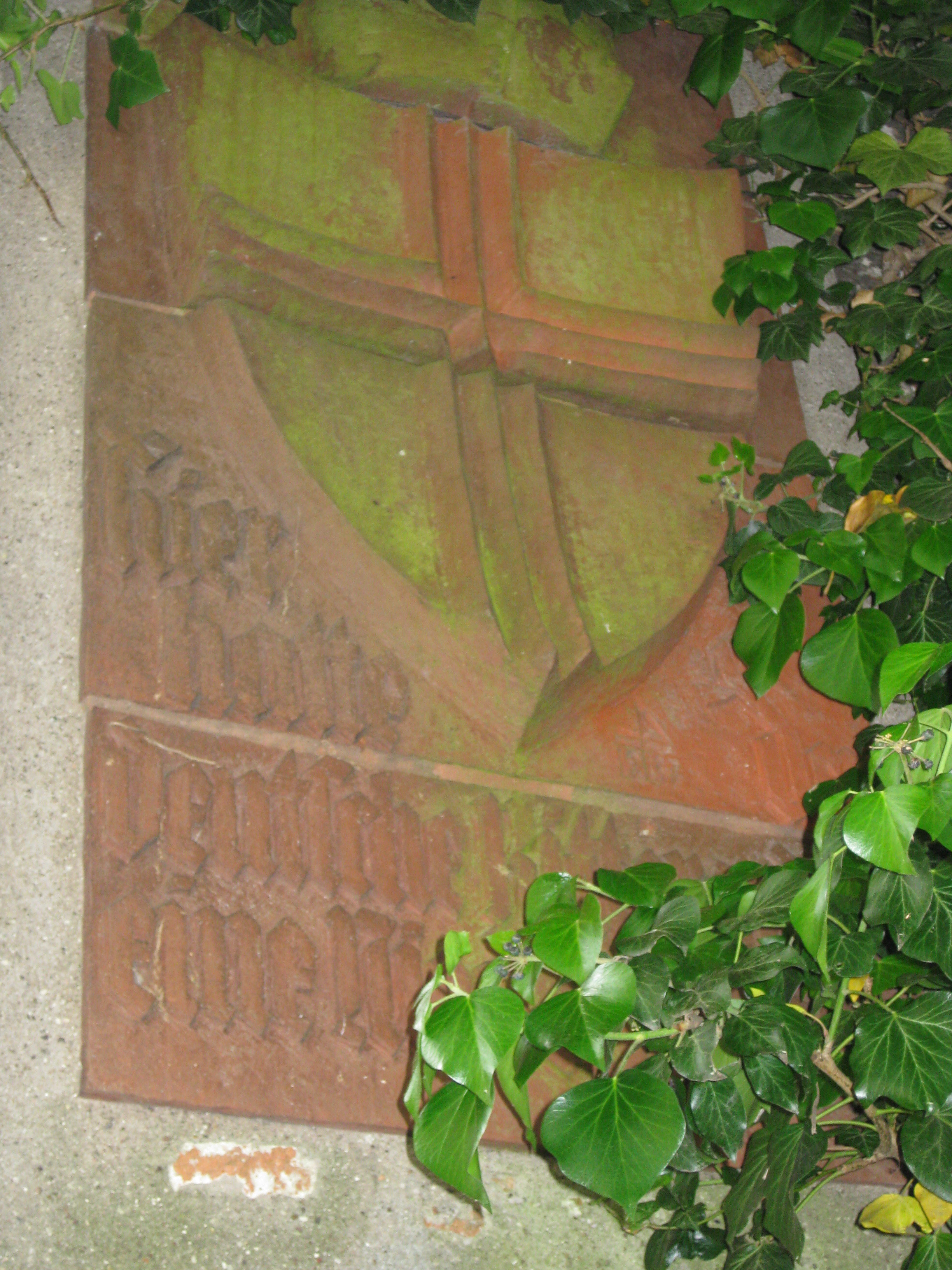 Erinnerungstafel an die frühere Niederlassung des Deutschen Ordens in der Kleinen Burgstraße der Lübecker Altstadt (Angebracht Mitte der 1930er). Das Gebäude des Ordens stürzte 1806 ein.